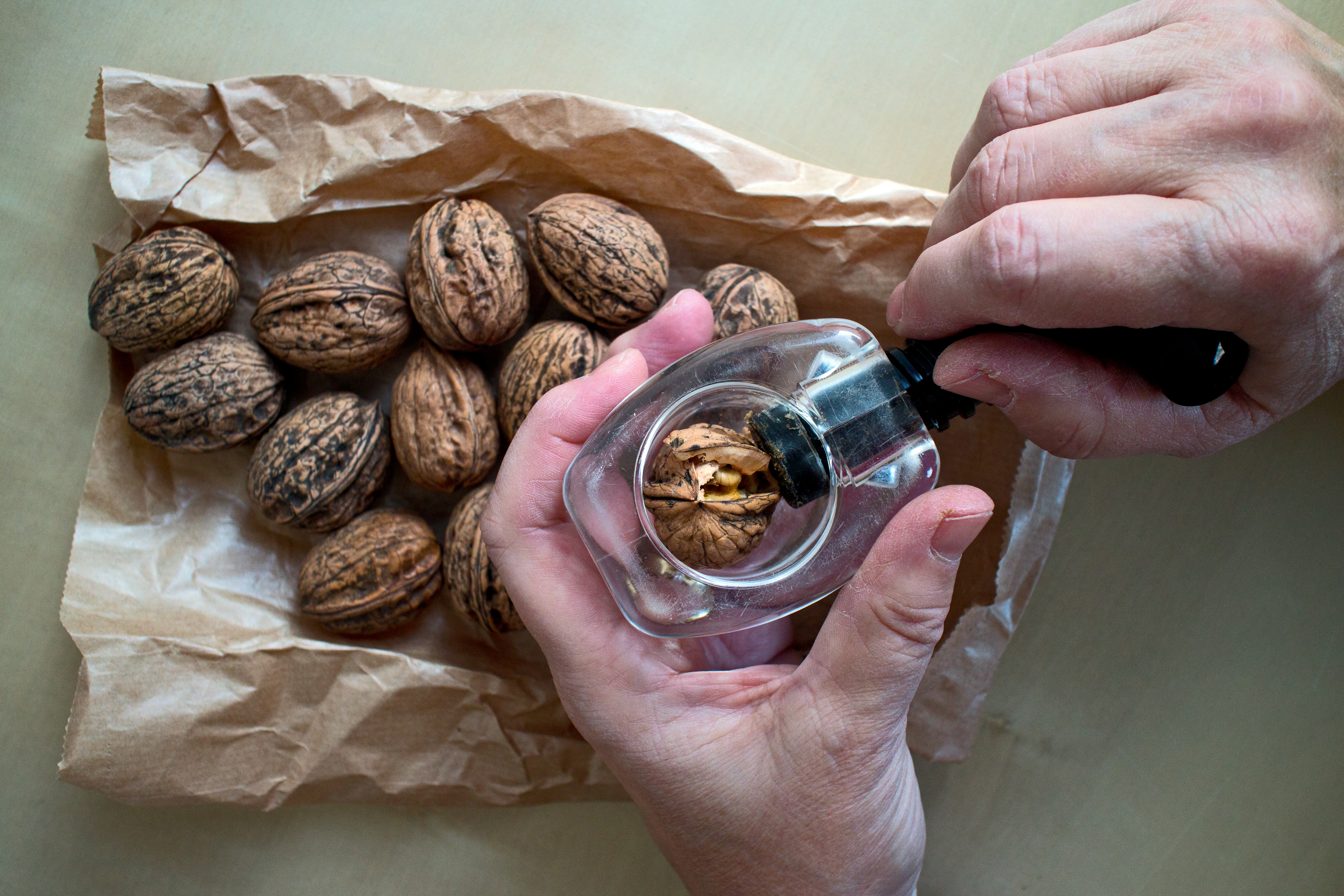 Het kraken van een walnoot. De noot ligt in een kommetje en door het draaien van het handvat ontstaat er druk op de noot en wordt de noot gekraakt.